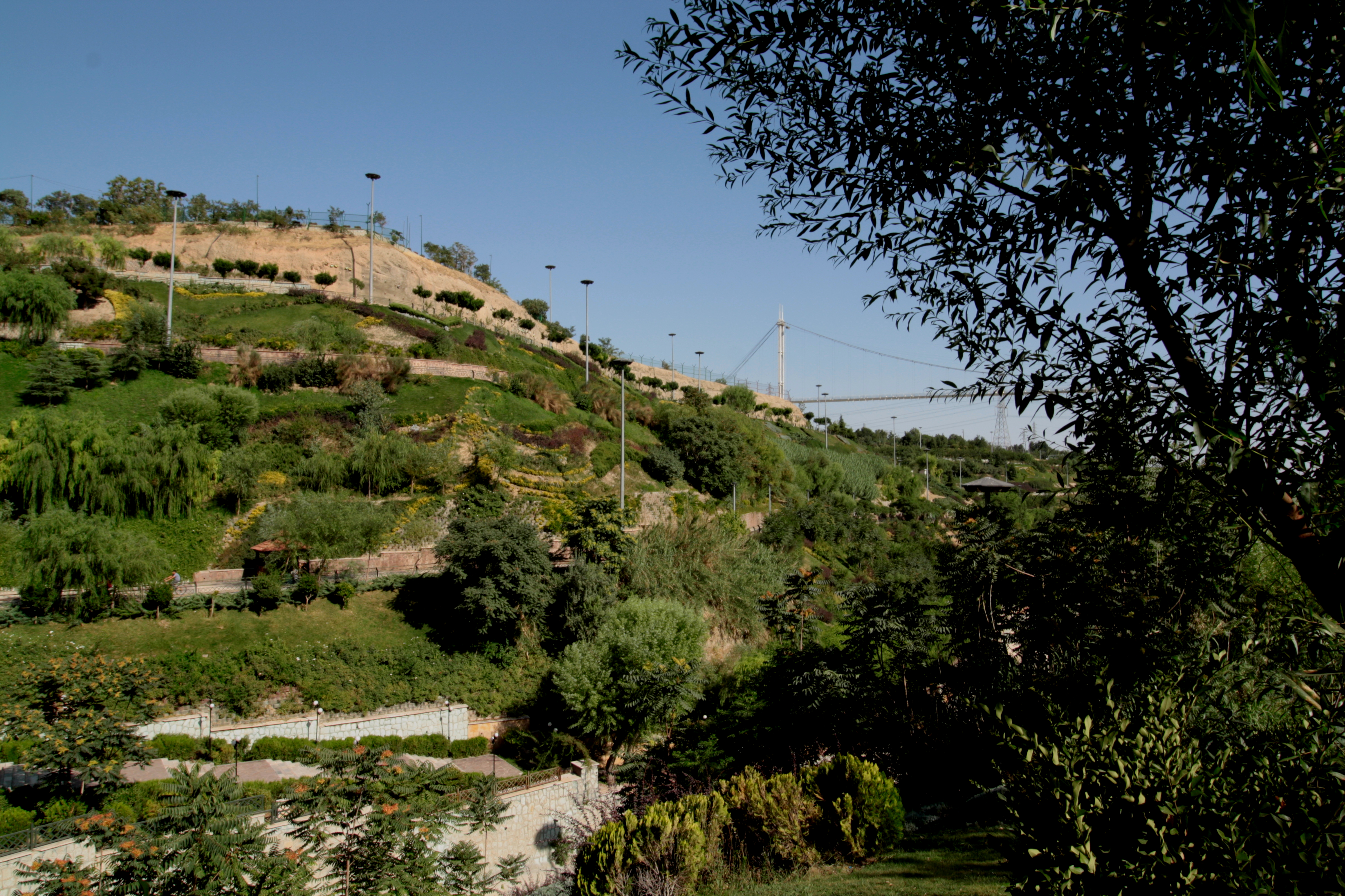 Nahjul Balaghe part, Tehran, Iran